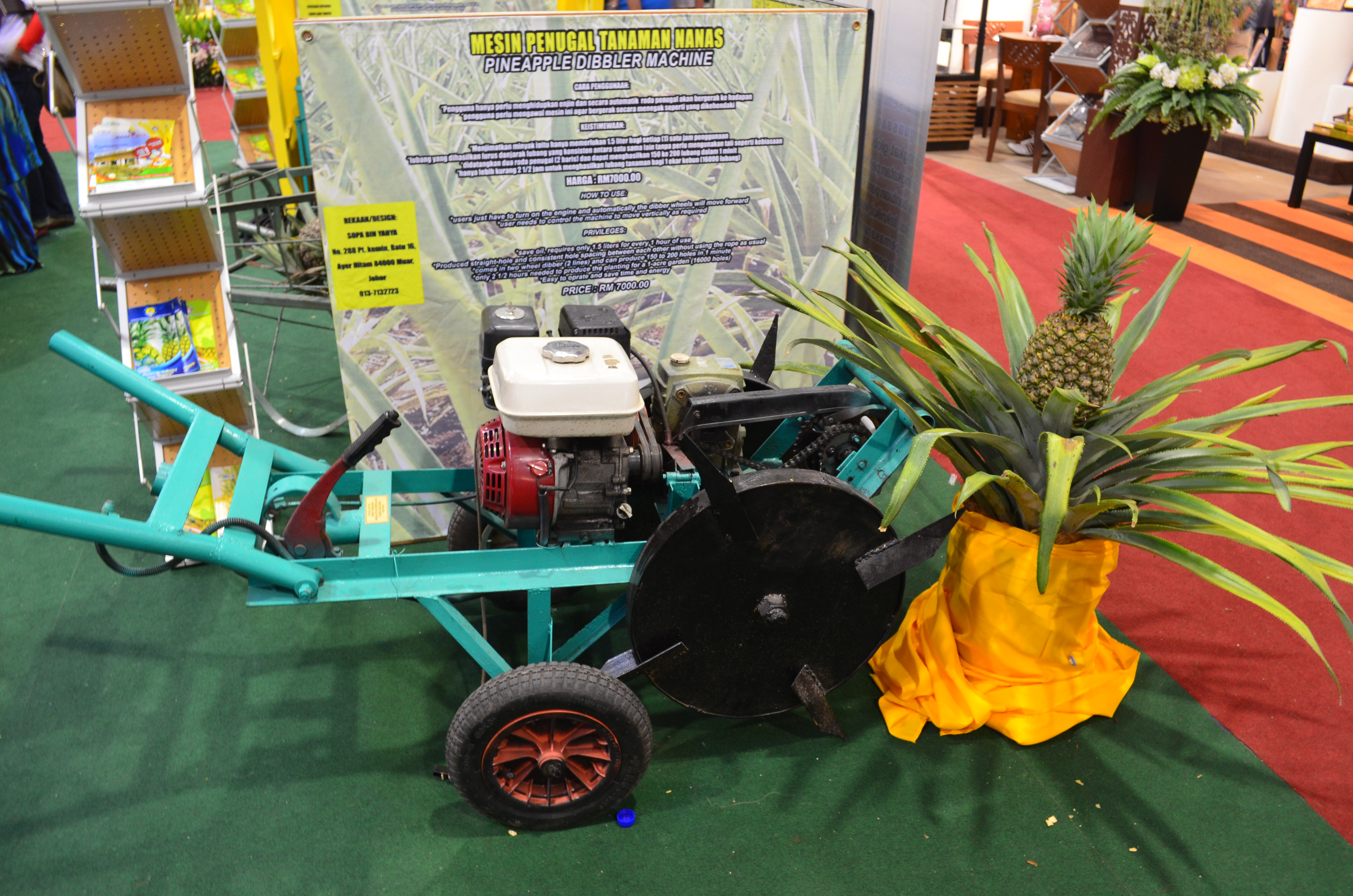 Mesin penugal tanaman nanas di pameran MAHA 2012.